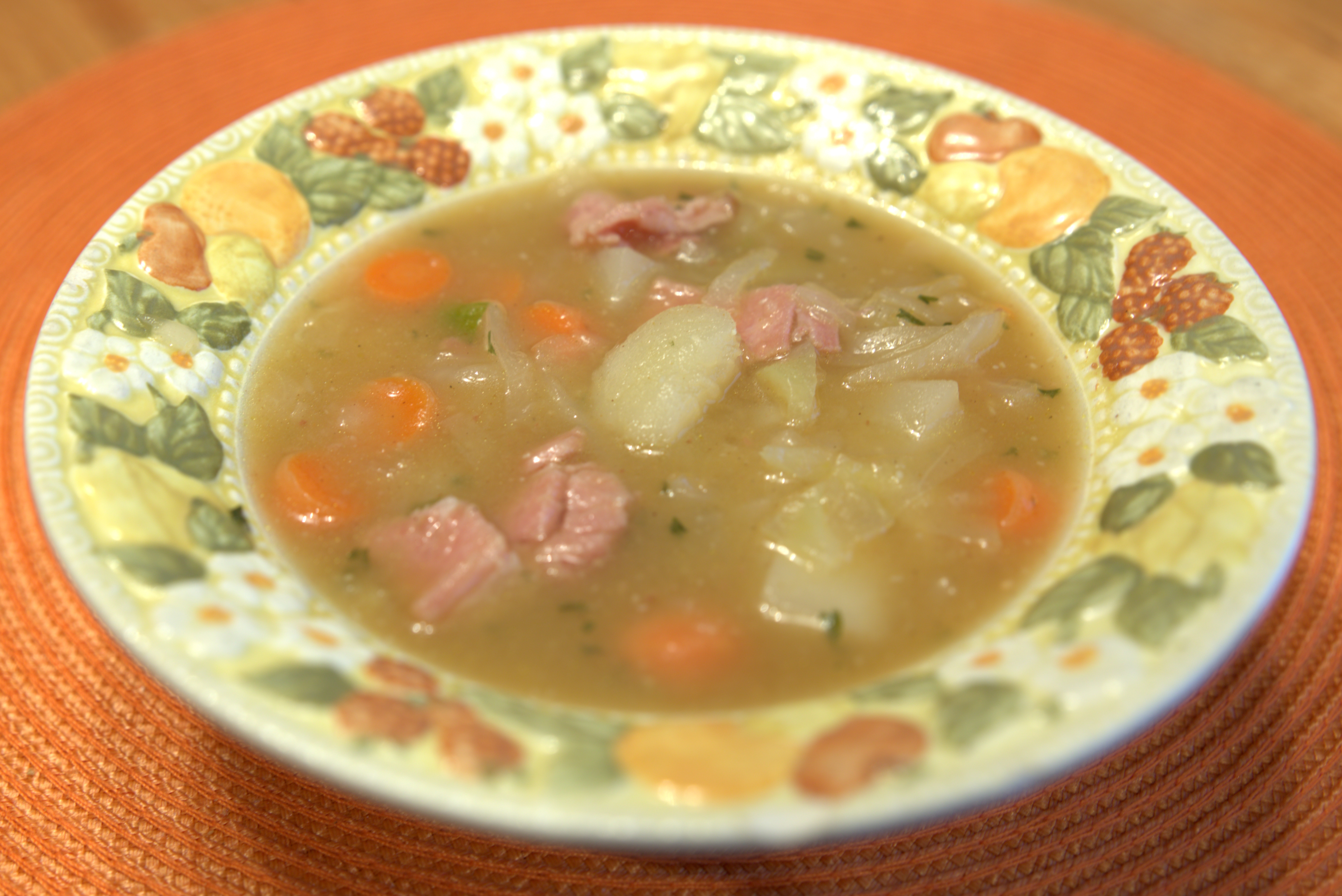 Kohlsuppe mit Weißkohl, Kartoffeln, Karotten und Zwiebeln sowie mit gepökeltem, grob gewürfeltem Schweinefleisch.